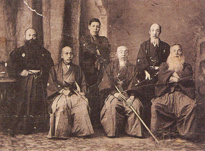 最晩年の大正2年、札幌で撮影された永倉新八（前方中央）